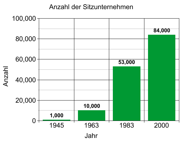 Die Veränderung der Anzahl der Sitzunternehmen in Liechtenstein.